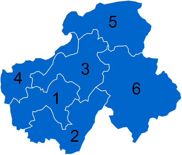 Résultats des élections législatives de Haute-Savoie en 2012